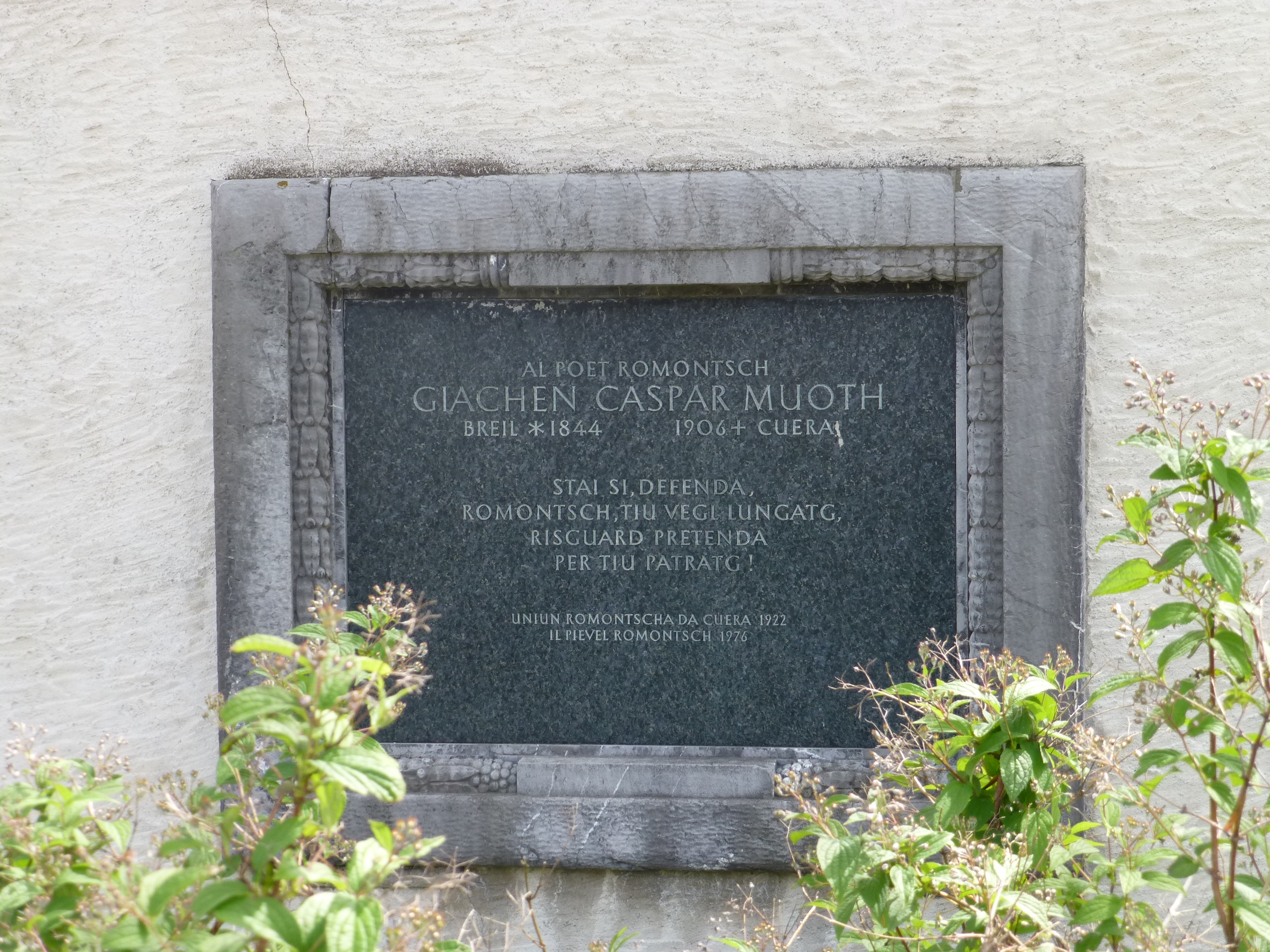 Gedenktafel von Giachen Casper Muoth, auch Giacun Hasper Muoth, (1844–1906), rätoromanischer Autor (Tafel am Friedhof Hof in der St.-Luzistrasse in Chur)